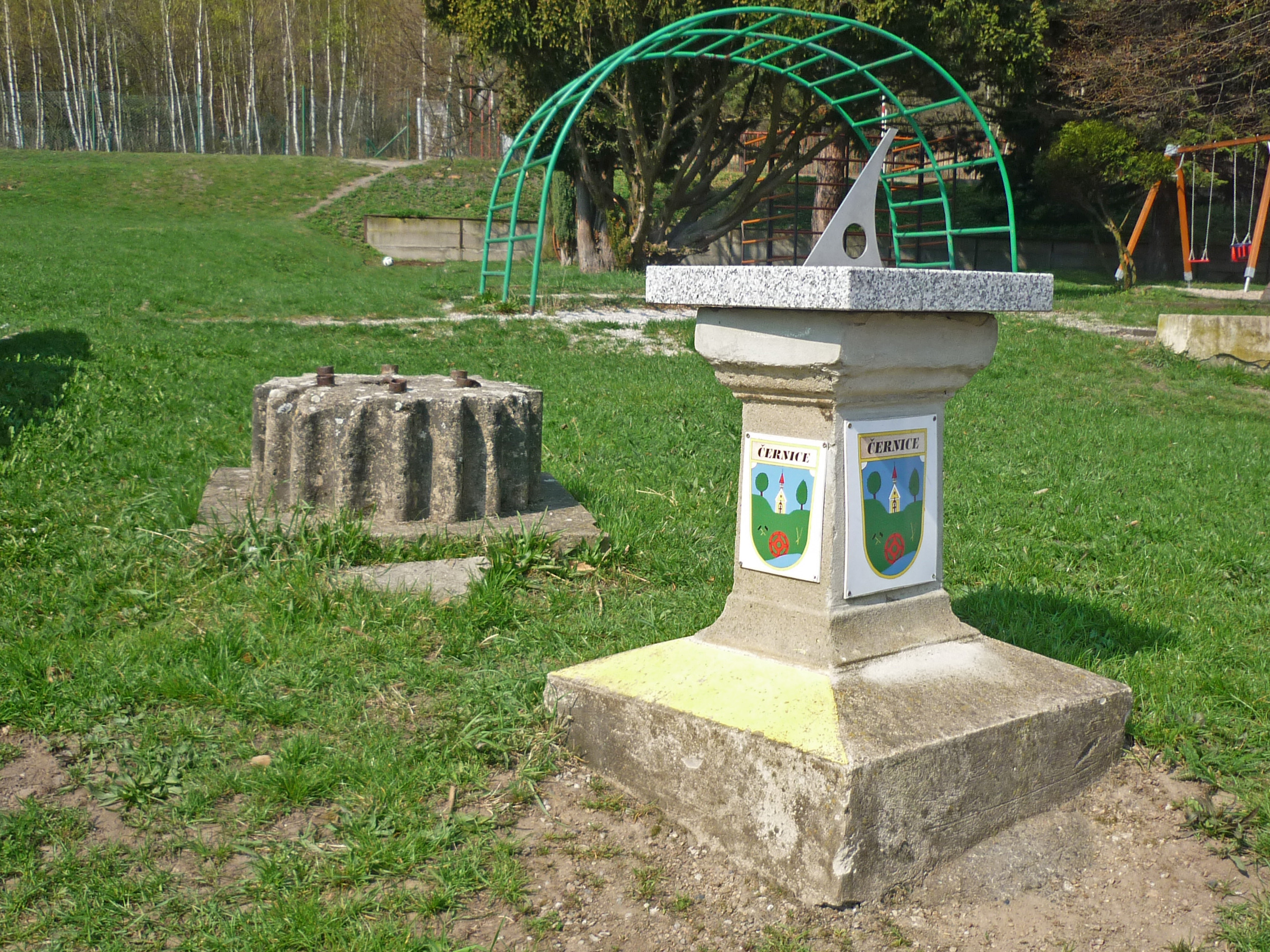 Sonnenuhr als Kleindenkmal zur Erinnerung an die ehemalige Kaiser-Franz-Josef-Jubiläumskapelle in Černice (Tschernitz), die nicht mehr existiert